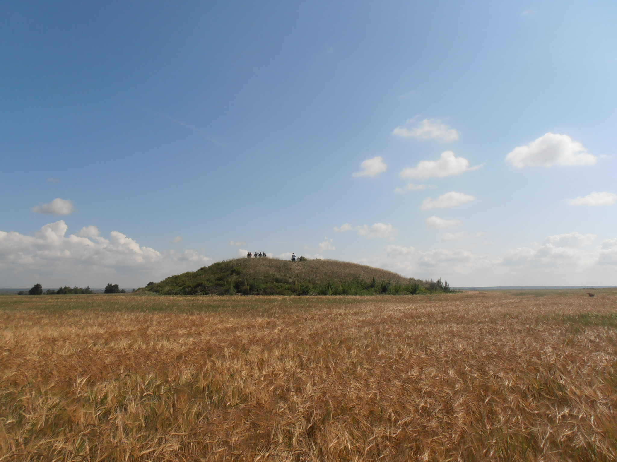 Курган Красногорский-2 в Ингальской долине (Исетский район Тюменской области, возле с. Красногорское). Вид с юго-запада.